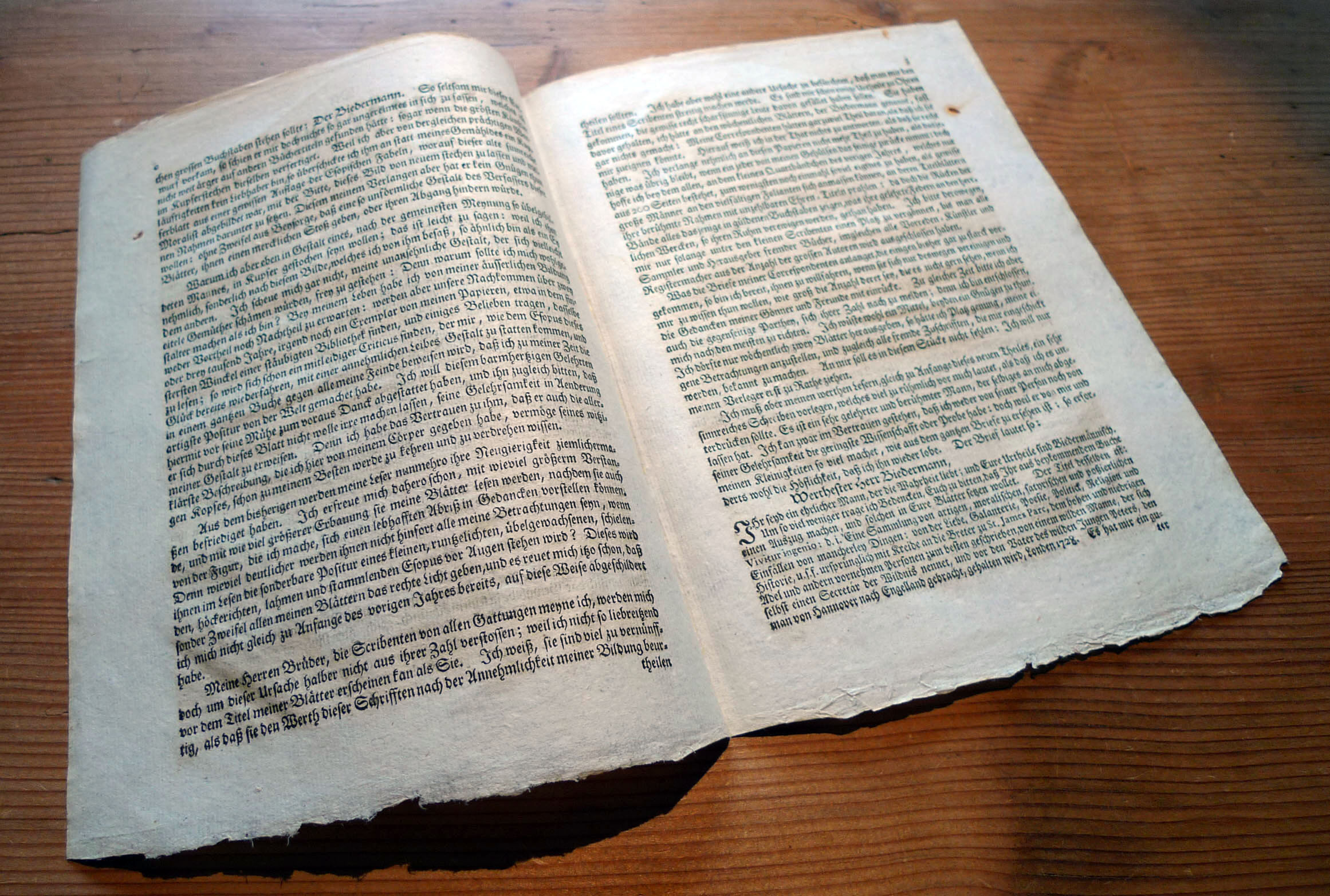 Der Biedermann, Innenseite vom 19. April 1728 (Privatbesitz)